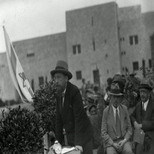 טקס הנחת אבן הפינה לבית הכנסת "ישורון" ירושלים, (בין הנוכחים נחום סוקולוב, ה. סאלד, ש.י.עגנון, ש.ד. גוייטין, מרדכי עליאש, אלכסנדר, עליאש, ראובן כצנלסון, אהרון וייסברג, דב, בן שבתאי, פייבל מלצר, מנחם אוסישקין, מרדכי בן הלל, יהושע השל פרבשטיין, הסופר רבי בנימין, הרבנים קוקי ברלין, בר אילן, עוזיאל יוסף, אסף, יעקב ברמן, הרץ- הרב הראשי של בריטניה, אוסטרובסקי המאירי, הפרופסורים - קליין, פרנקל, מרדכי לבנון נשיא "ישורון", נערי מקהלת "שירת ישראל" בניצוחו של ש.ז. ריבלין)